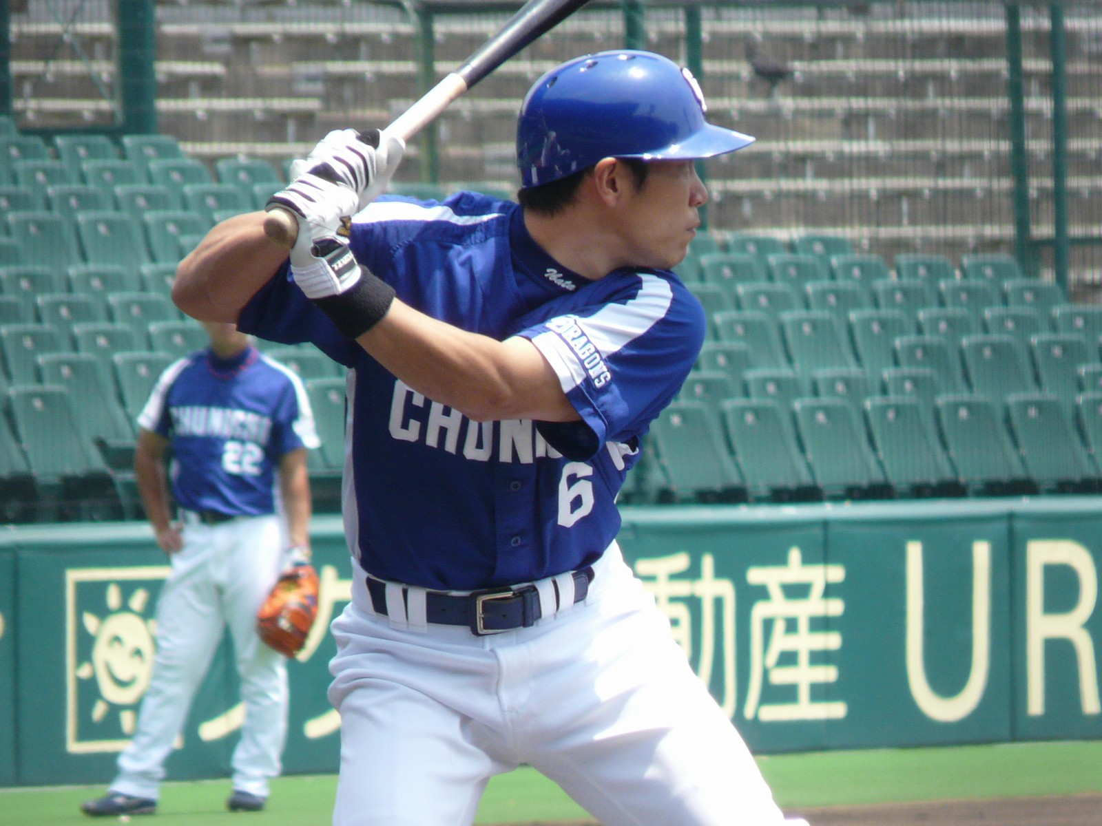 Copied from 画像:CD-Hirokazu-Ibata.jpg: "井端弘和"